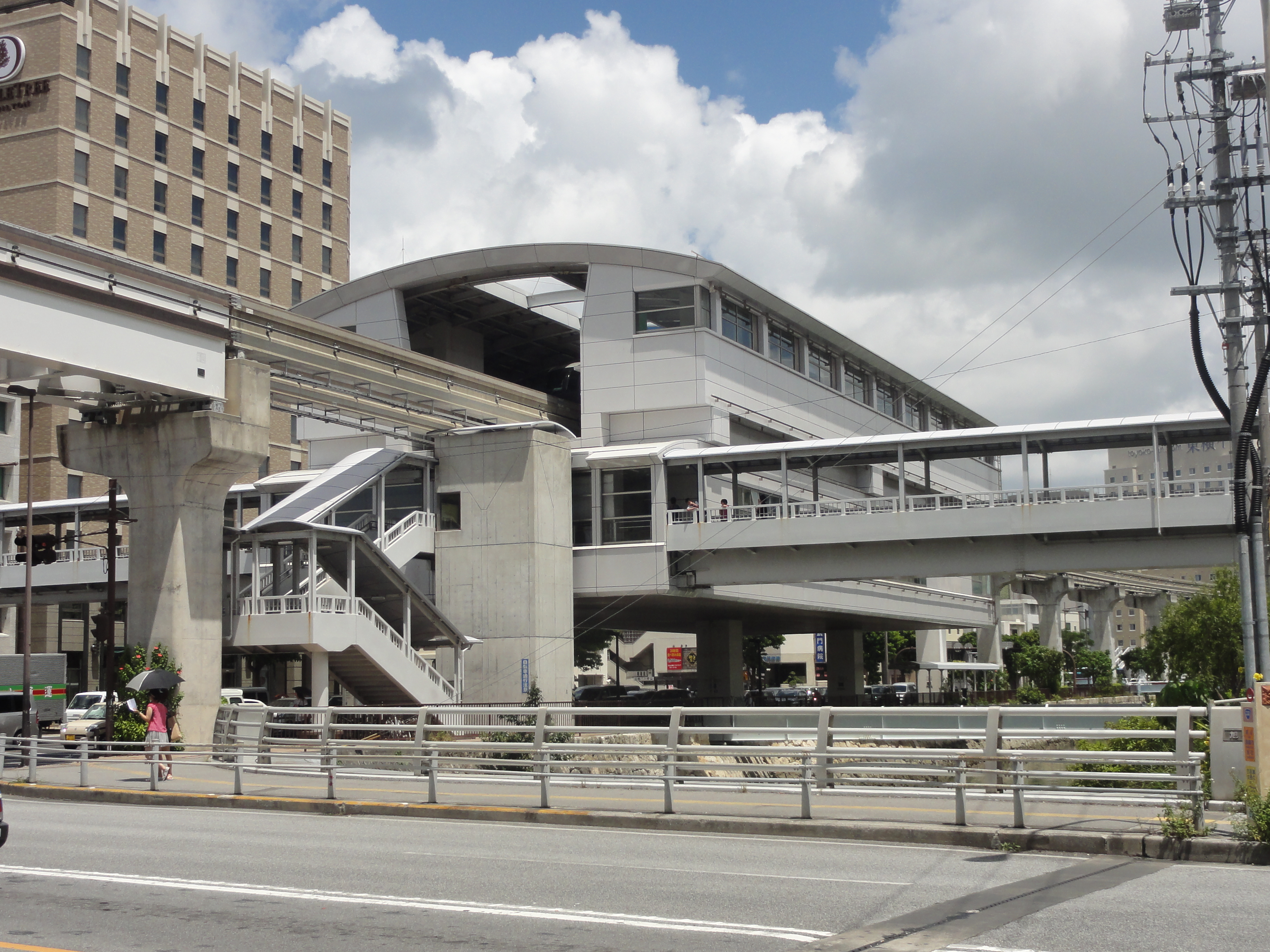 沖縄都市モノレール旭橋駅。